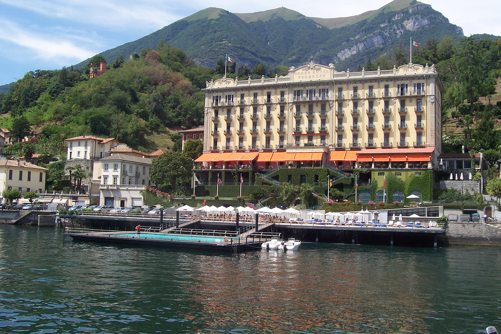 Grand Hotel in Tremezzo, Como, Italy